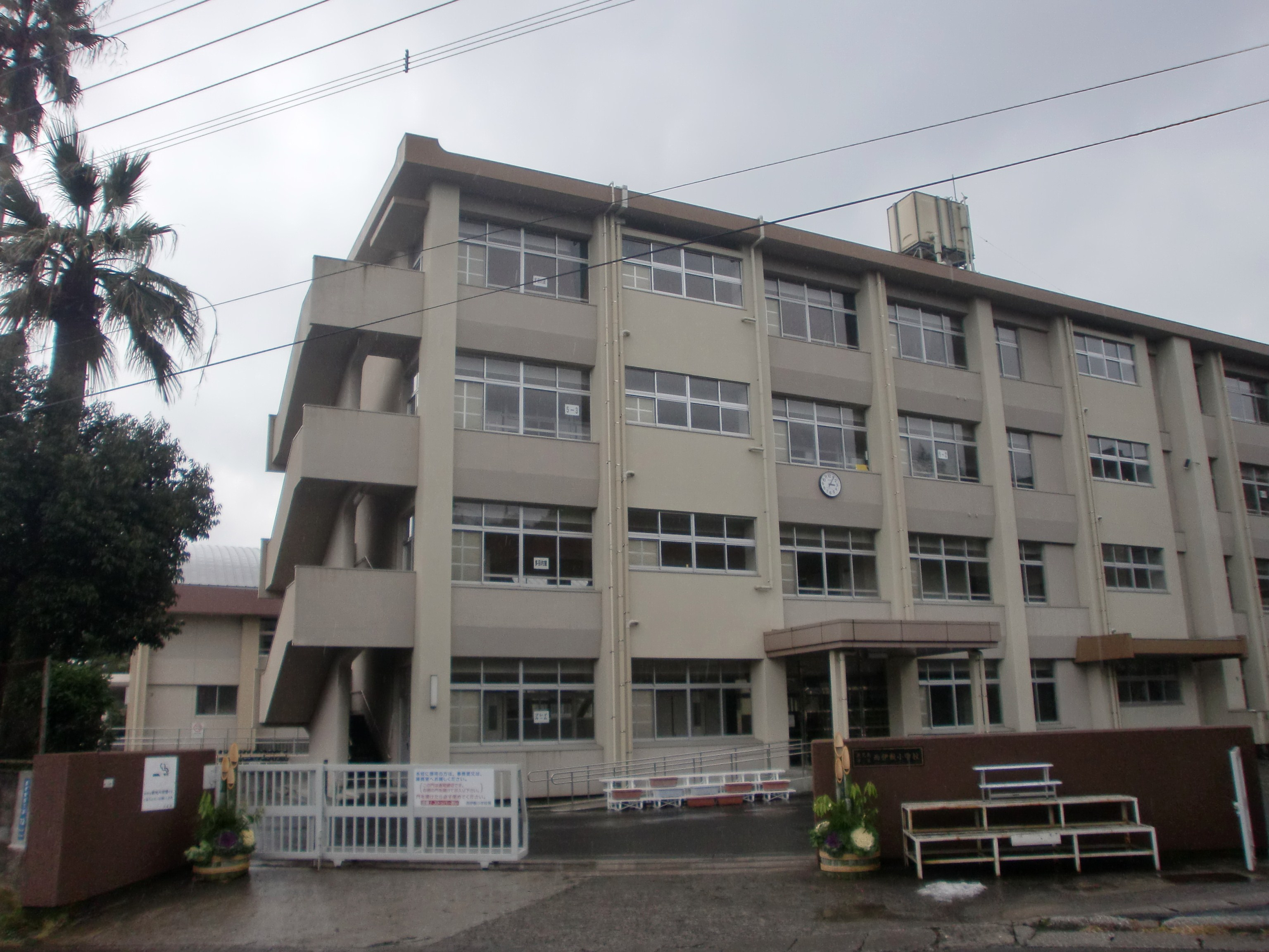 鹿児島市立西伊敷小学校の外観。